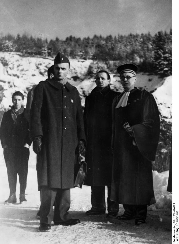 Rastatt, Kriegsverbrecherprozess, Ortstermin Illus-SNB Das Gericht über die früheren Anführer in deutschen faschistischen Todeslagern. Das Tribunal in Rastatt hat 550 frühere Kapos und Aufseher der faschistischen Todeslager zu verurteilen. Die Richter führen den Prozess an Ort und Stelle, wo die Verbrechen verübt wurden, also in dem früheren Todeslager. Dieses Lager befindet sich in einer großen Grotte 1000 mtr. über dem Meeresspiegel in Chasly (in der französischen Okkupationszone). Die Häftlinge mussten täglich eine Strecke von 12 km hin- und zurück , bis zu ihrer Arbeitstätte , wo riesige unterirdische Werke für die Kriegsproduktion gebaut wurden, zurücklegen. Die Häftlinge arbeiteten unter sehr schwierigen Verhältnissen und wurden von den Faschisten stets bedroht und gefolter. Durch den Hunger , Erschöpfung und schwerer Arbeit wurde sehr hohe Sterblichkeit der Häftlinge verursacht. Auf dem Bild: Das Gericht von Rastatt mit seinem Vorsitzenden M. Drapie im Gebirge, wo das Lager war. 5050-50